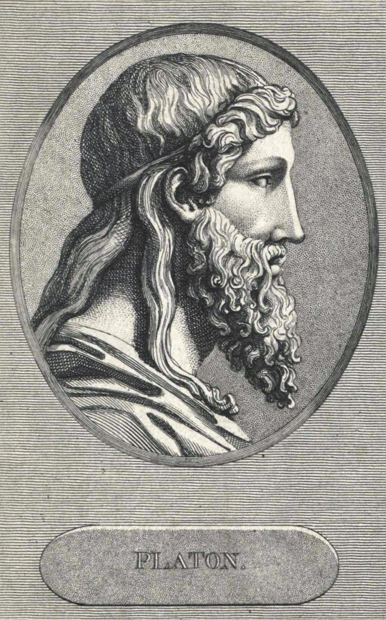 Plato (427 v Chr - 347 v Chr)